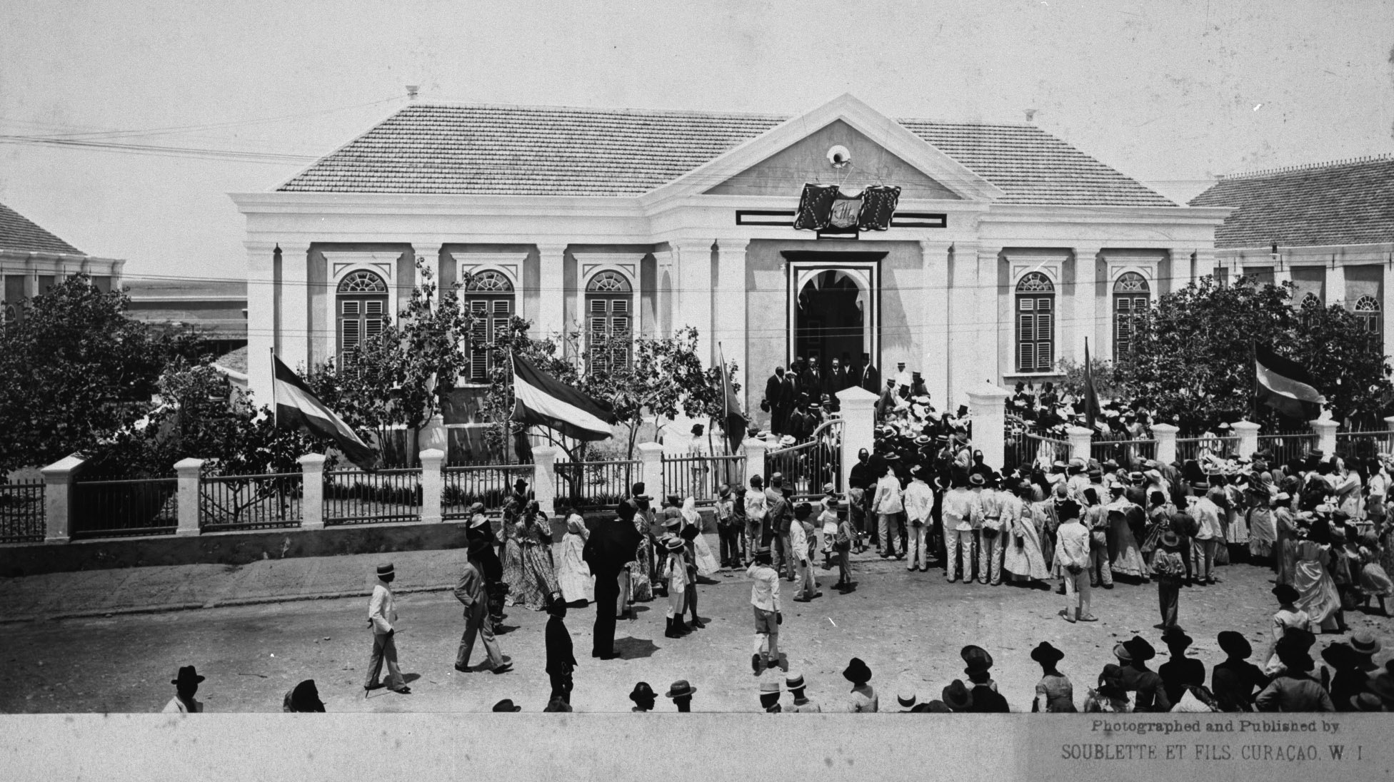 foto.